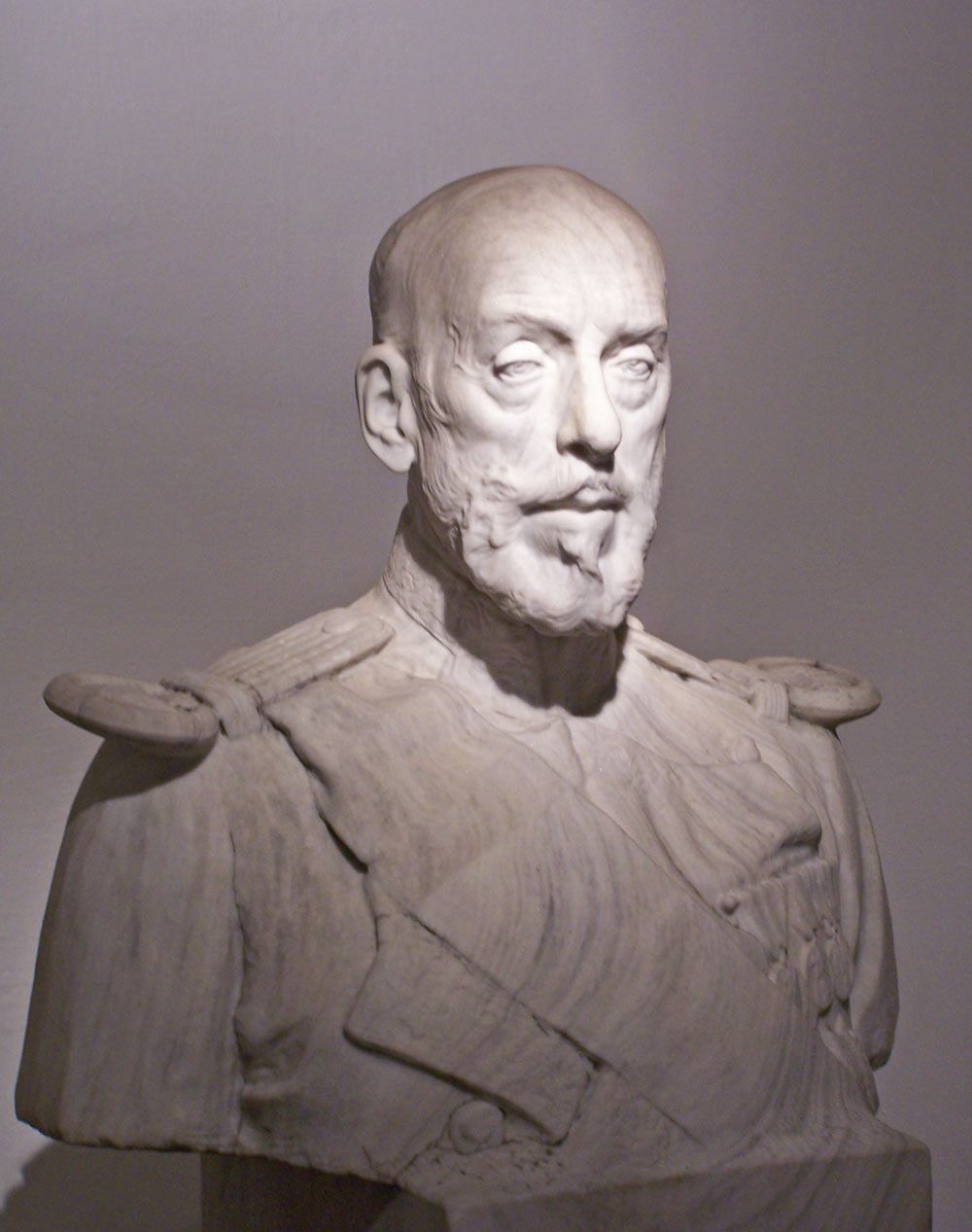 Busto de Julio Quesada-Cañaveral, duque de san Pedro de Galatino realizado en 1931 por Mariano Benlliure, conservado en el Museo Casa de los Tiros de Granada